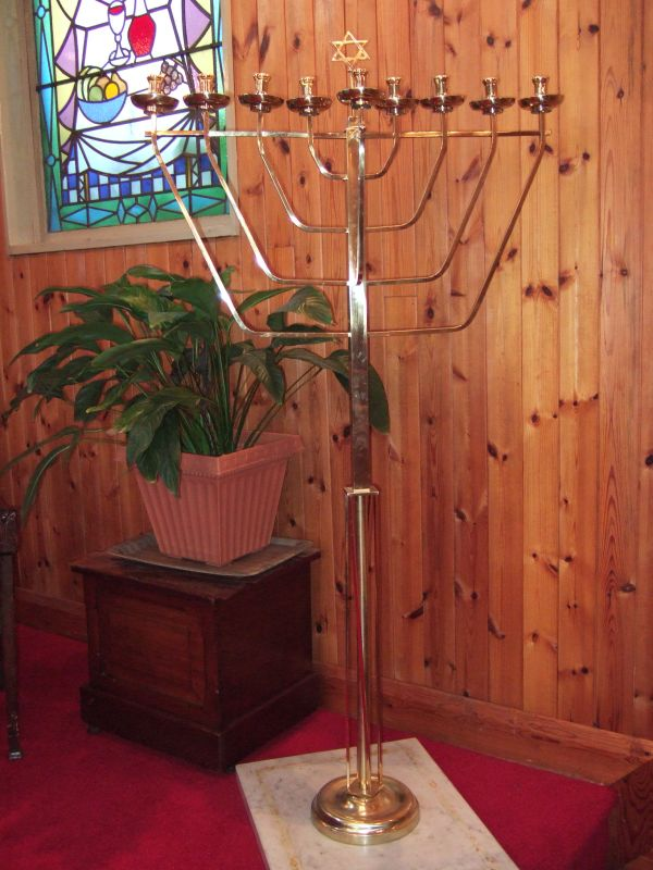 Hanukka candles